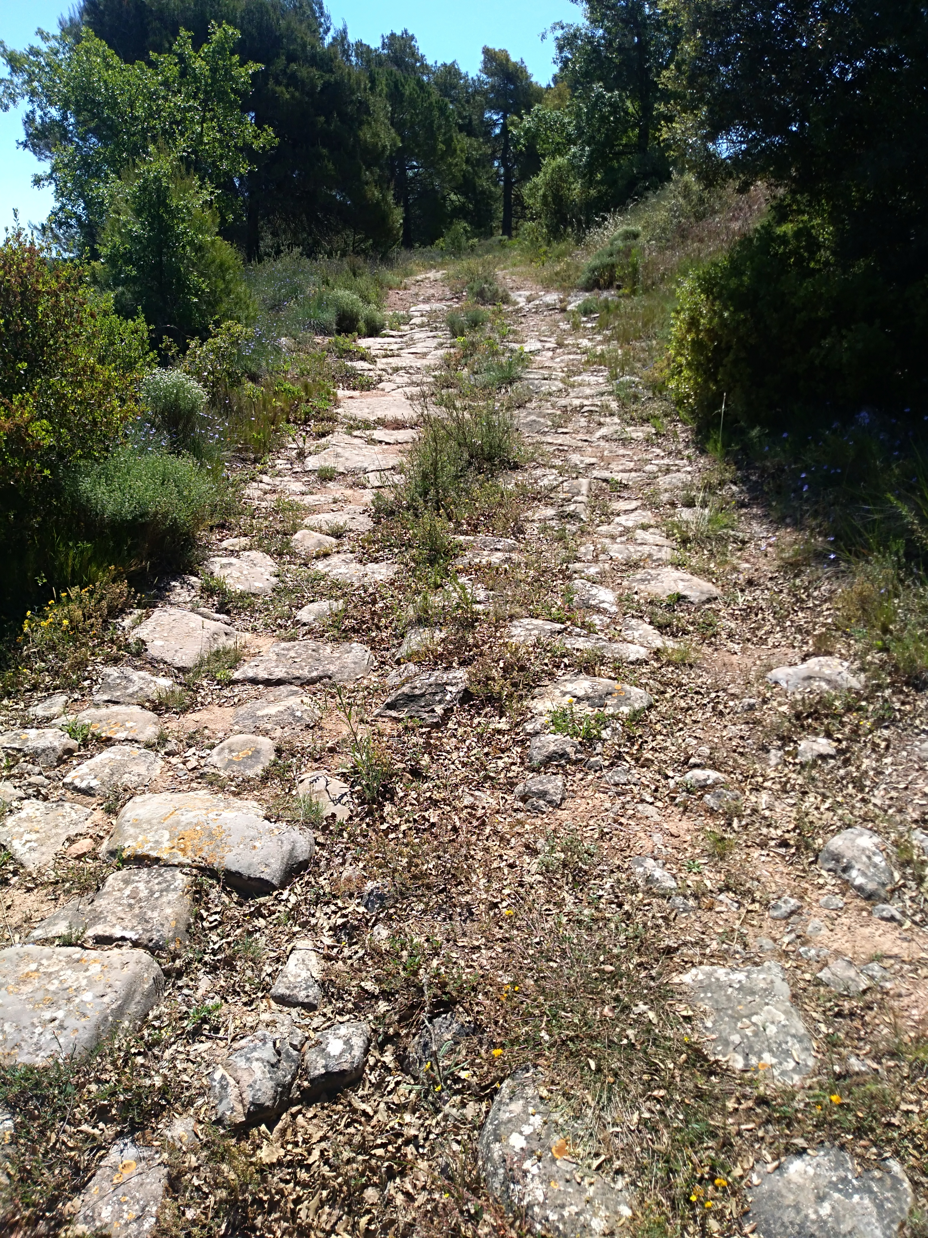 Tram empedrat de via Romana del segle I